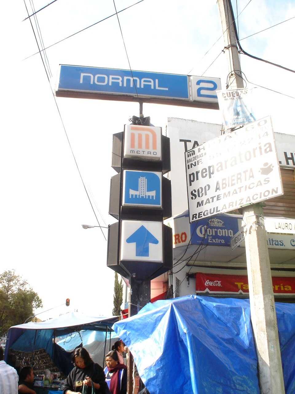 ESTACION NORMAL Date Taken: 22 12 2006